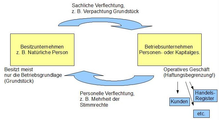 Darstellung einer üblichen Betriebsaufspaltung.